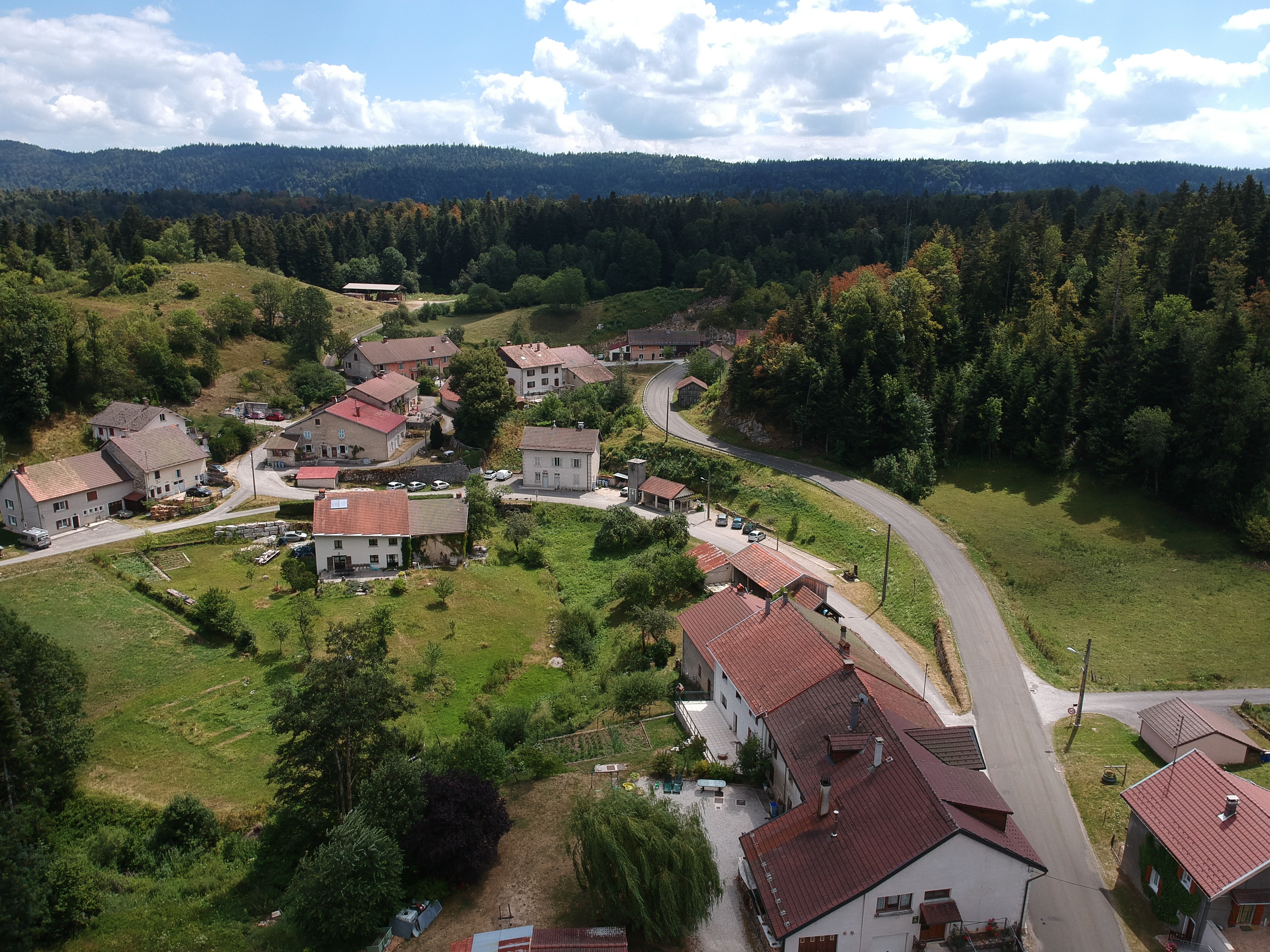 Vue aérienne de Châtel-de-Joux en juillet 2018.